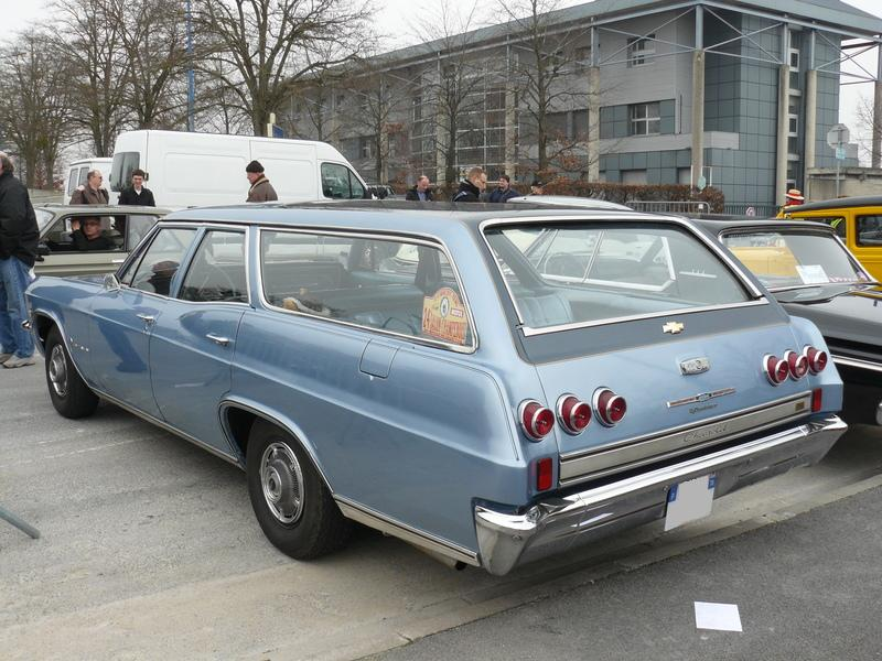 Français cadien: Reims 2012